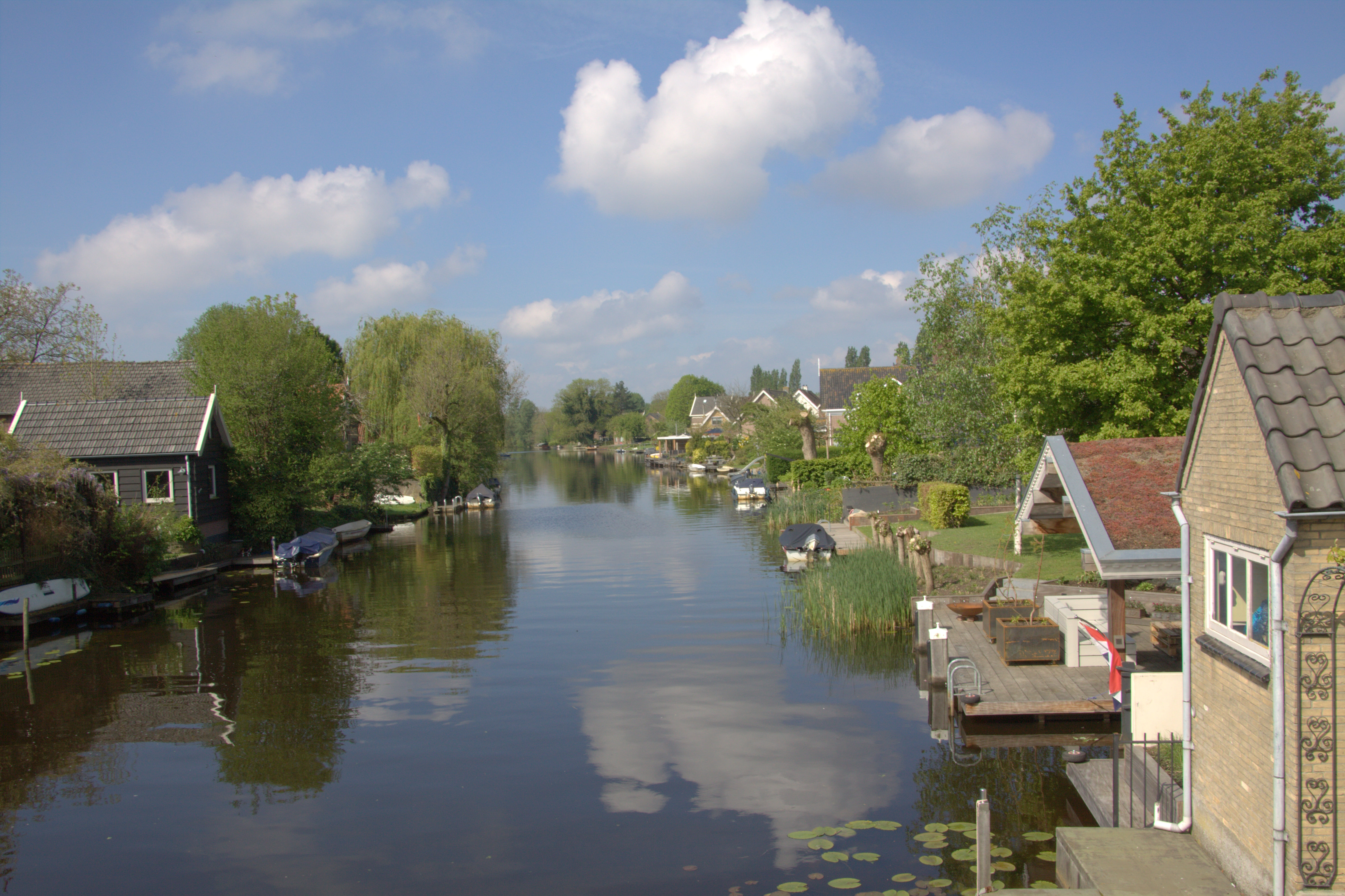 Midden in Oud-Alblas zien we van af de brug de veenrivier de Alblas, de Alblasserwaard en Oud-Alblas hebben er hun naam aan te danken.